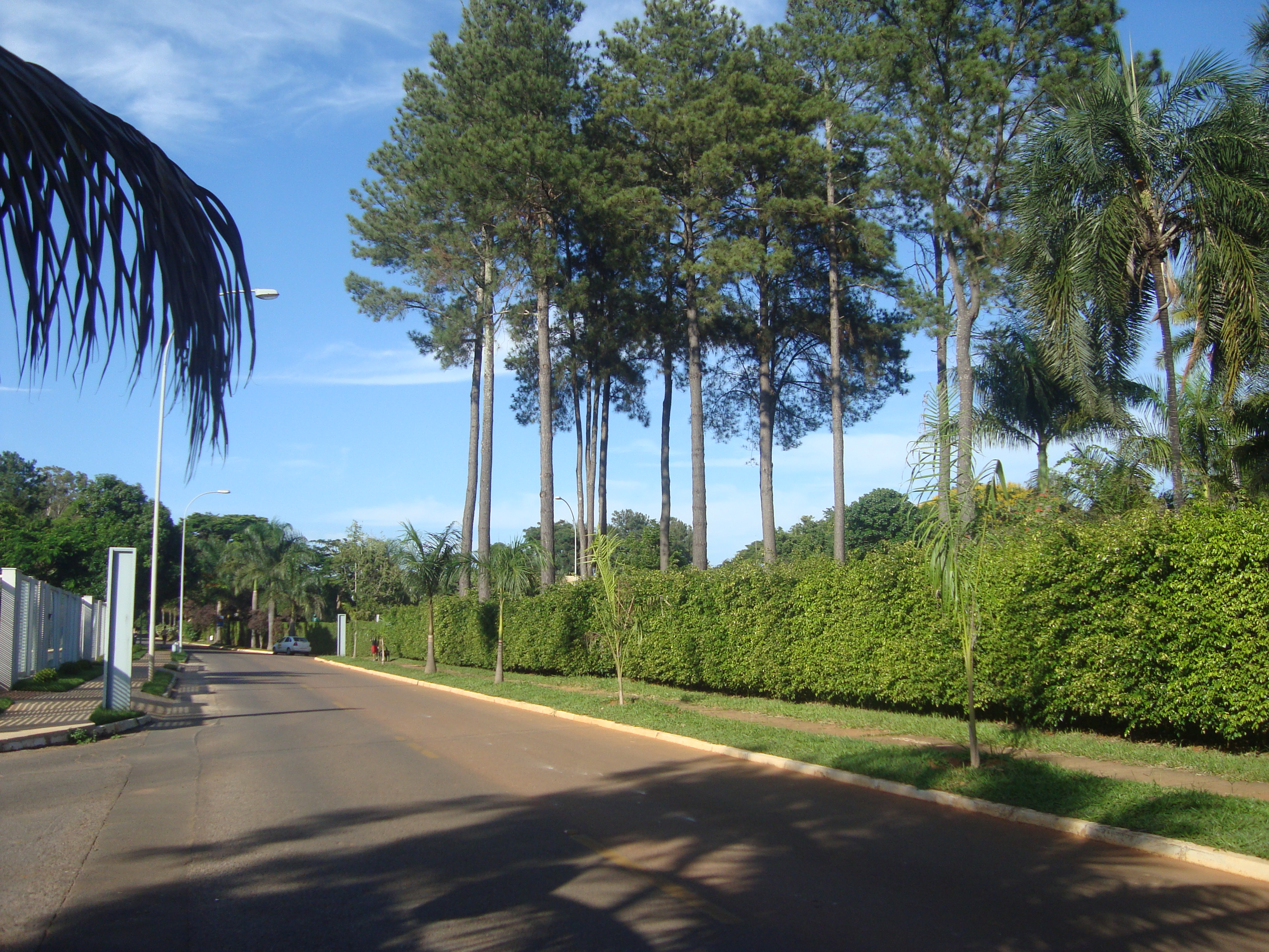 Conjunto 17